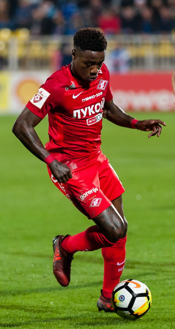 Quincy Promes